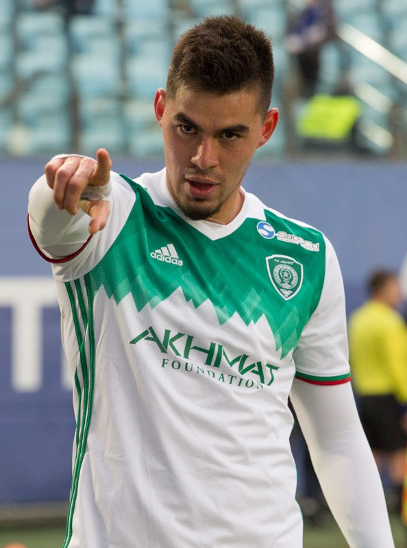 Wilker Ángel